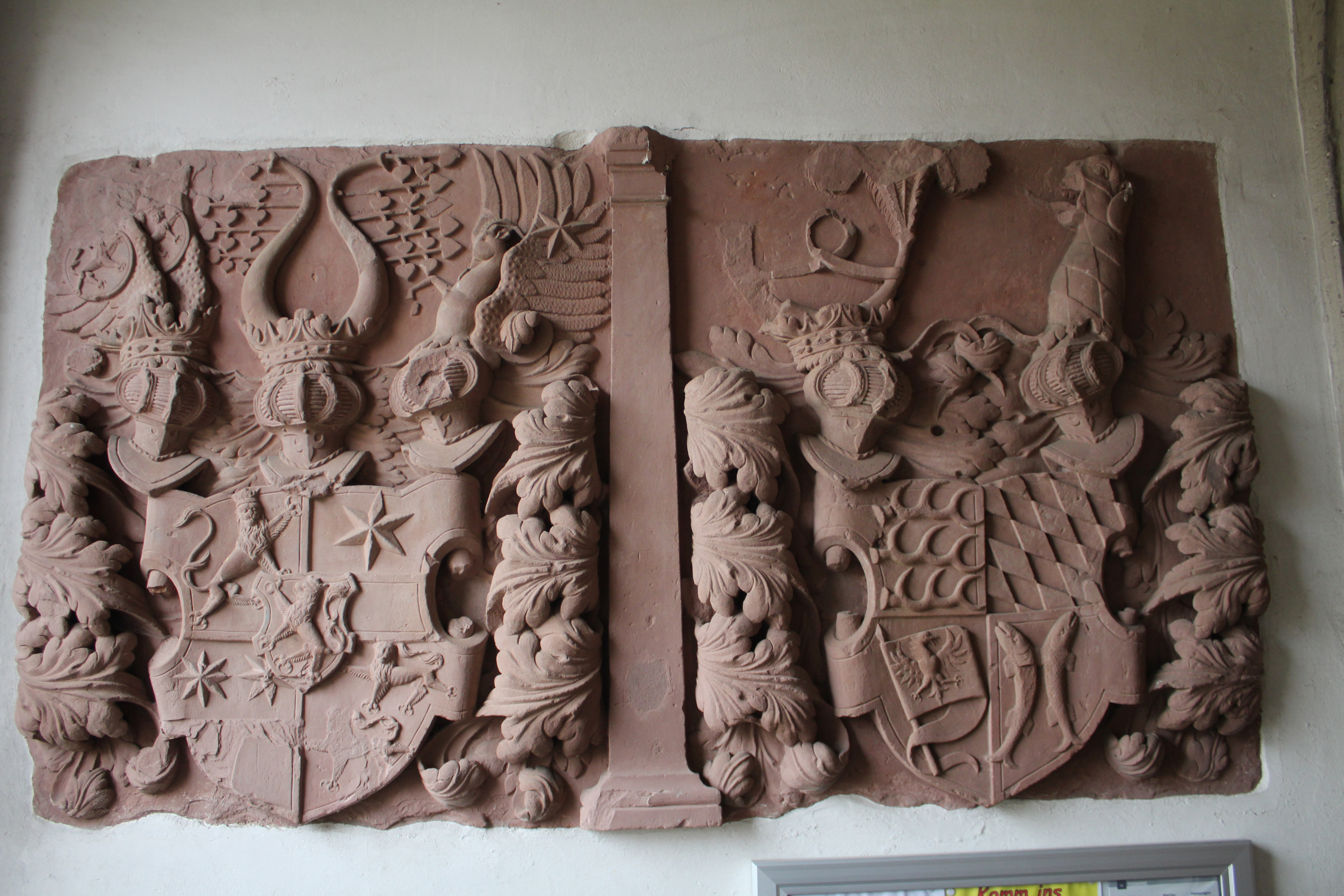 Evangelische Kirche Merlau, Gemeinde Mücke, Vogelsbergkreis, Hessen, Deutschland